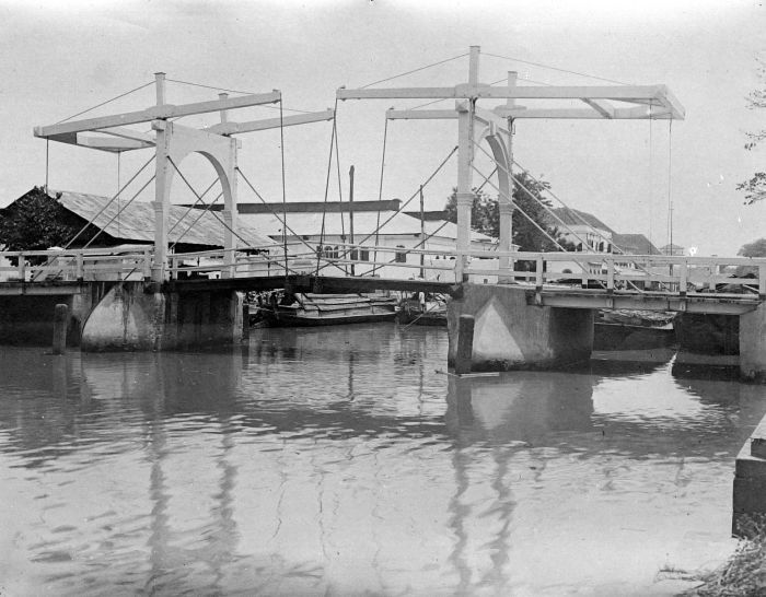 Repronegatief. Dubbele ophaalbrug (Hoenderpasarbrug), Batavia